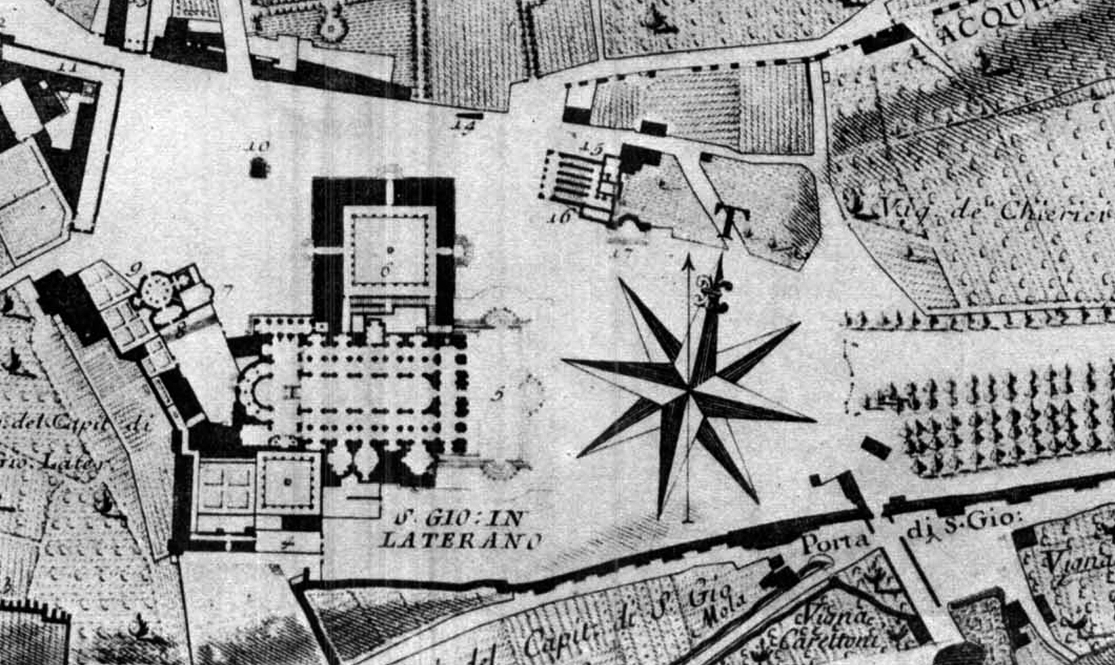 Rosa de los vientos, detalle del mapa Nolli (mapa de Roma por Giambattista Nolli); fotomontaje retocado